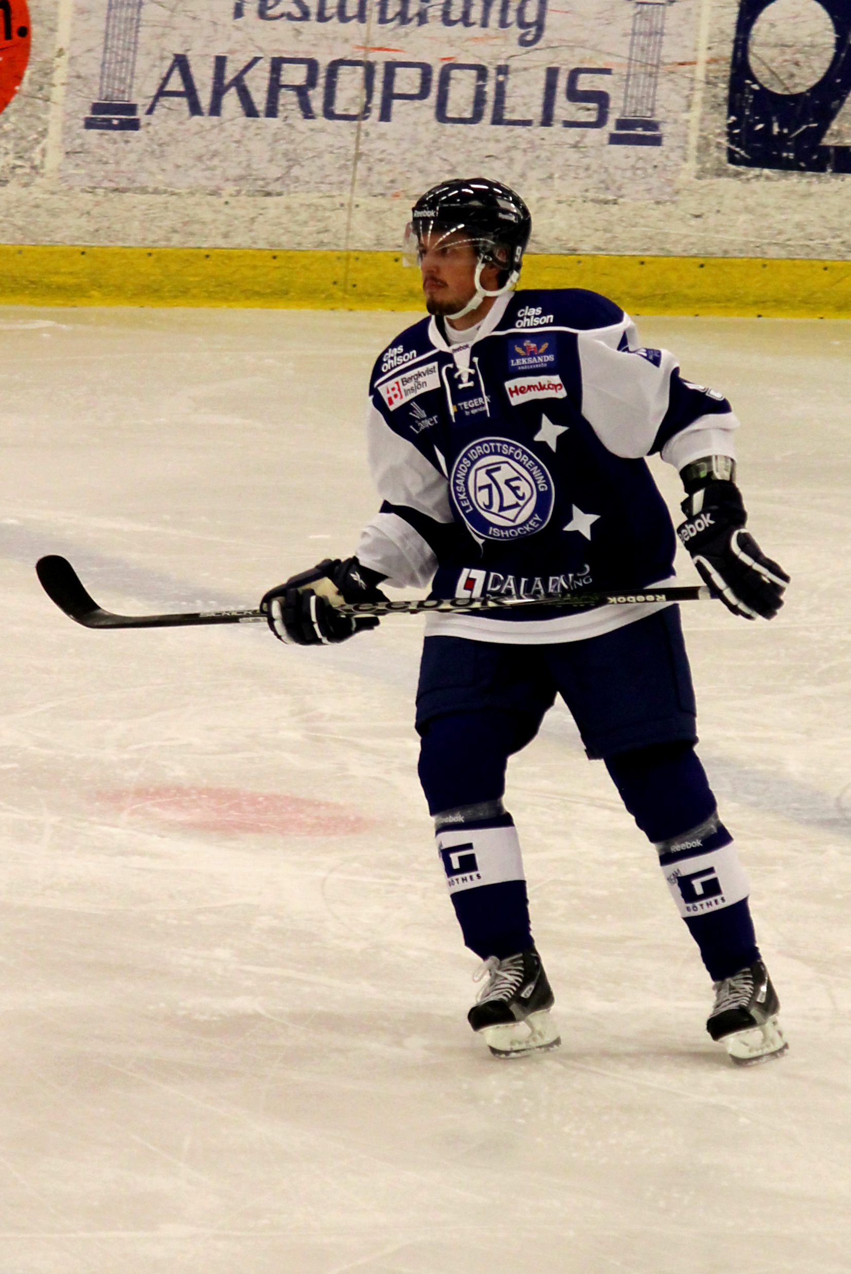 Alexander Deilert. Träningsmatch mellan Leksands IF och Bofors IK, Bolidenhallen, Hedemora